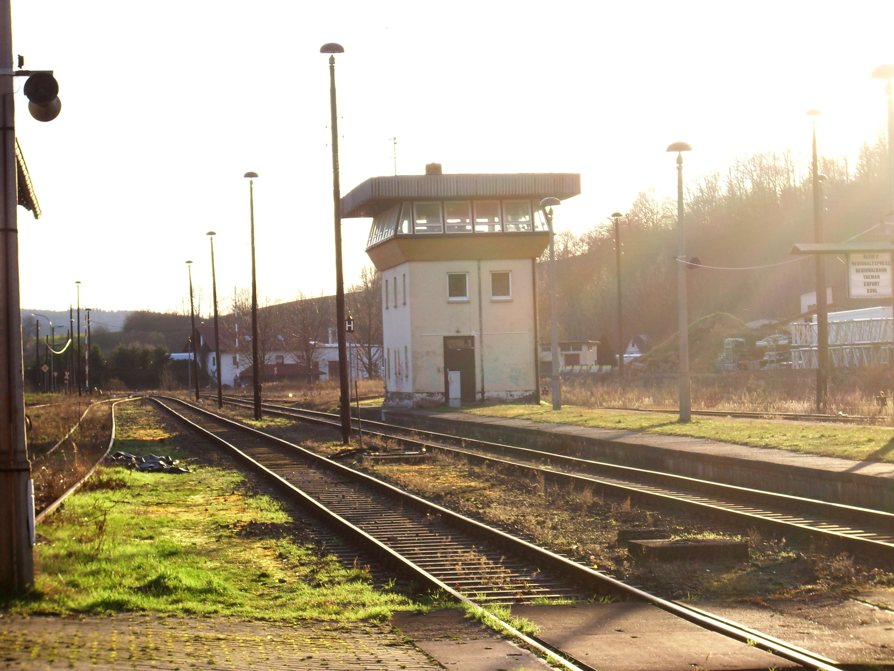 Das Stellwerk im Schleusinger Bahnhof. Dahinter führt die südliche Ausfahrt nach Themar. Gegenlichtaufnahme, deshalb nachgedunkelt